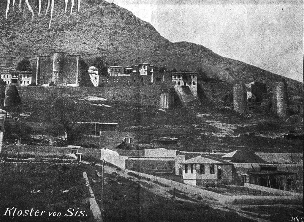 Armenisches Katholikat in Sis (heute Kozan)